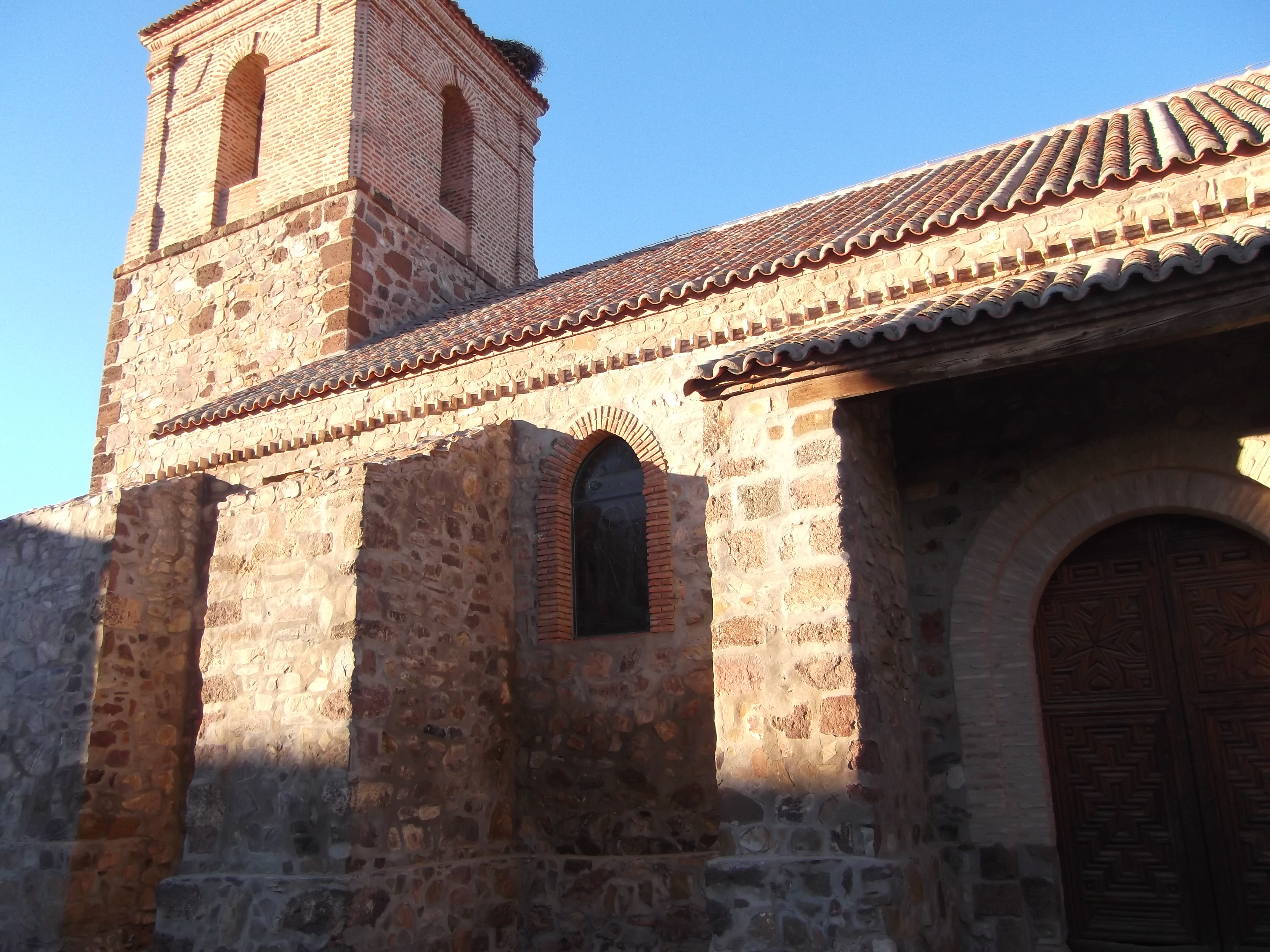 Iglesia parroquial San Sebastián (Porzuna) tras la remodelación de la plaza en que se incoa.